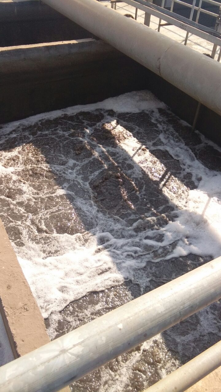 या प्रथम प्रक्रियेत सांडपाण्यातील घटक उदा. प्लास्टिक पिशव्या, लाकूड असे पदार्थ त्या जाळीमध्ये अडकून वेगळे होतात आणि पाणी पुढील प्रक्रियेसाठी पाठवले जाते.